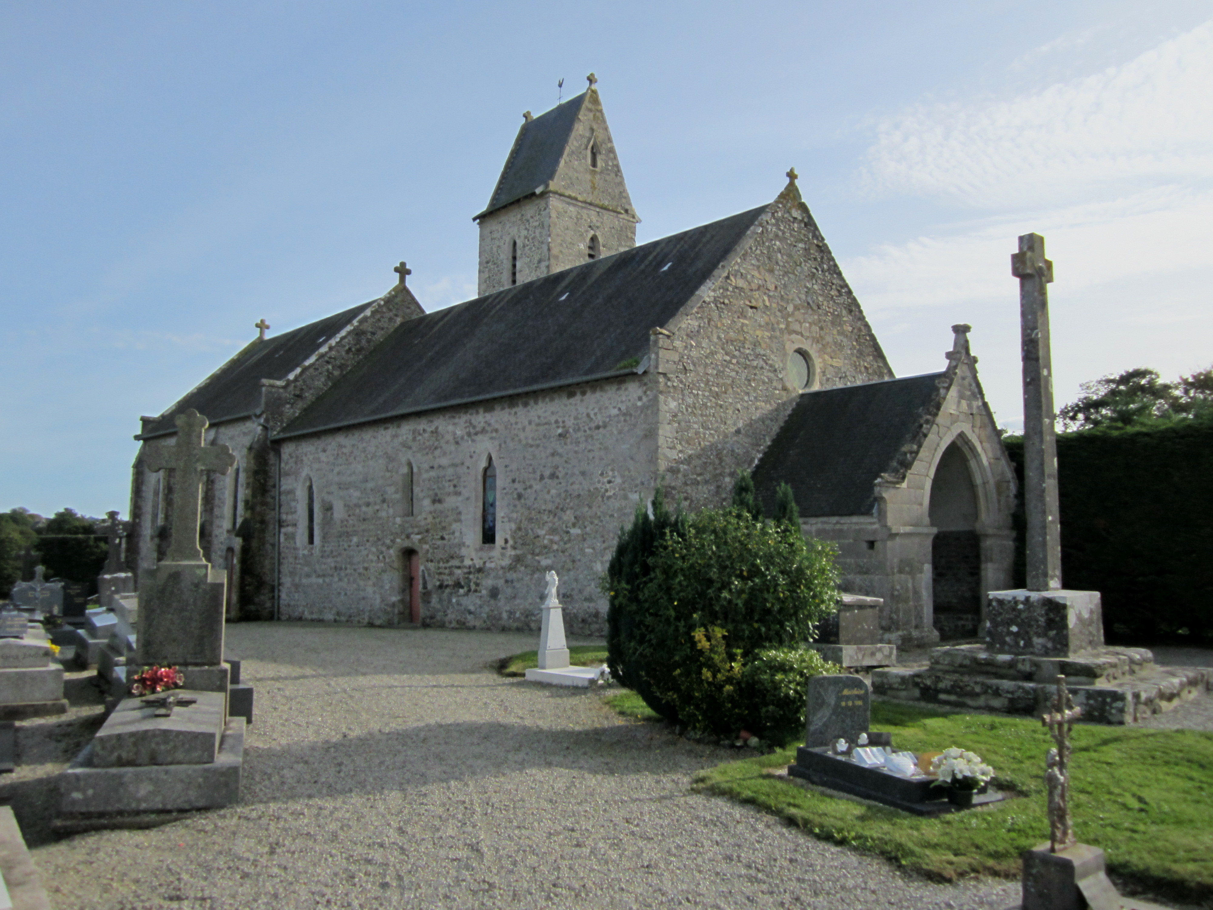 Ancteville, Manche